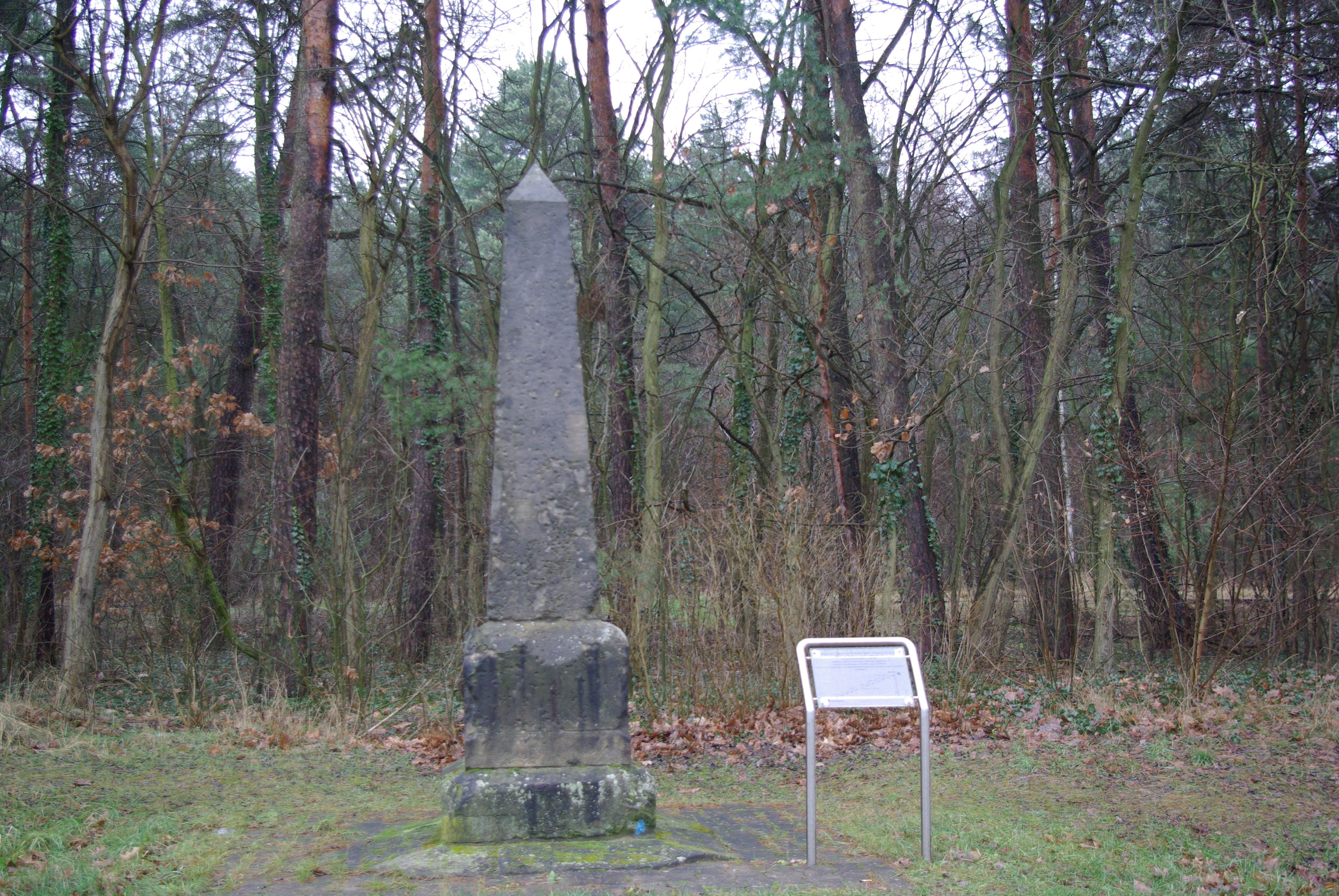 Mittenwalde Ortsteil Motzen in Brandenburg. Die Postmeilensäule liegt an der alten Poststraße Dresden - Berlin. Sie wurde etwa 1820 errichtet, und zeigt an, das es noch 5 Meilen bis Berlin - Cottbuser Tor sind. Die Säule steht unter Denkmalschutz.